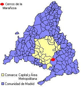 Mapa localizador de los Cerros de la Marañosa, ubicados en el sureste de la Comunidad de Madrid, España.